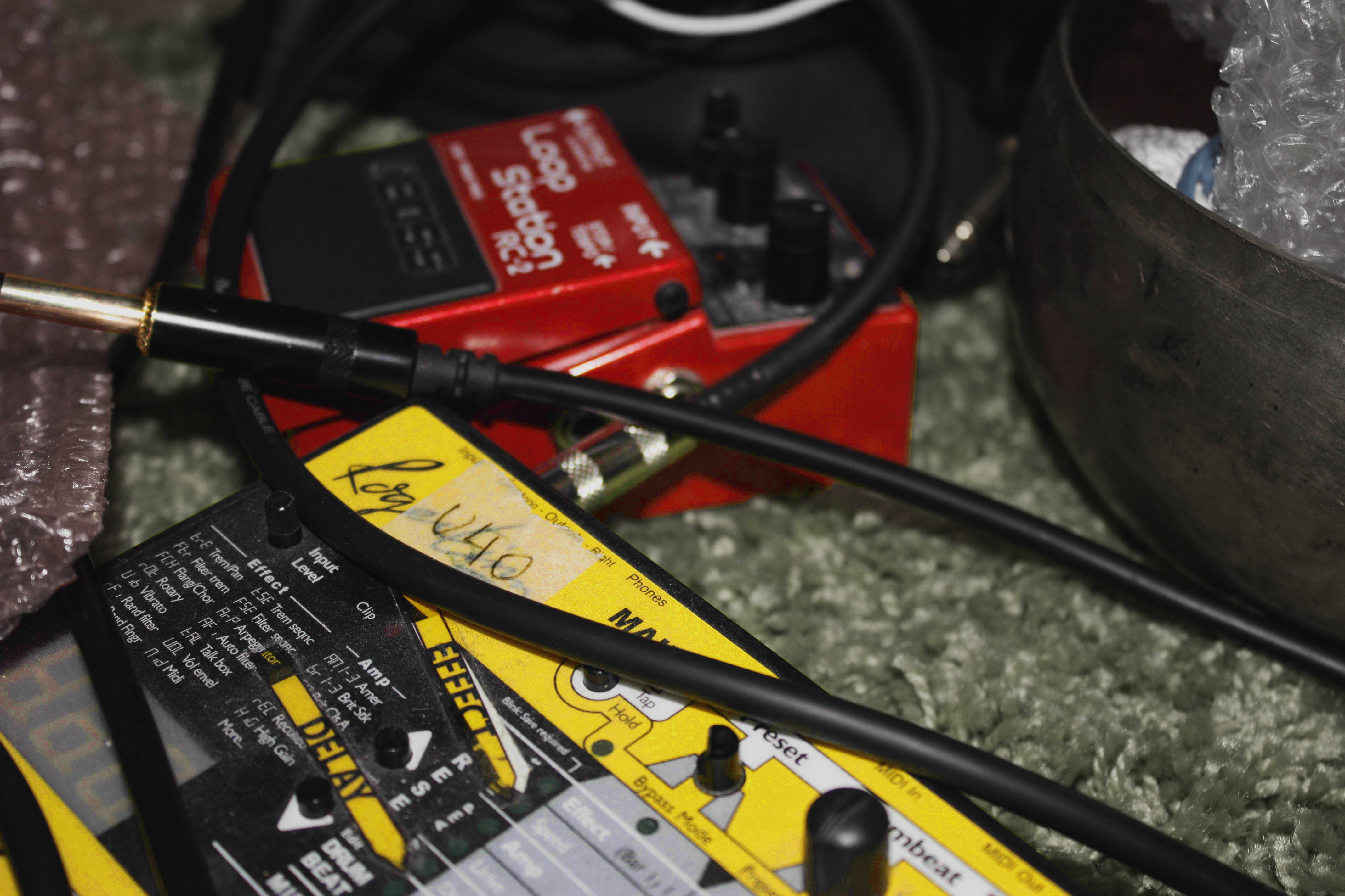 Roger Linn AdrenaLinn II Boss RC-2 Loop Station